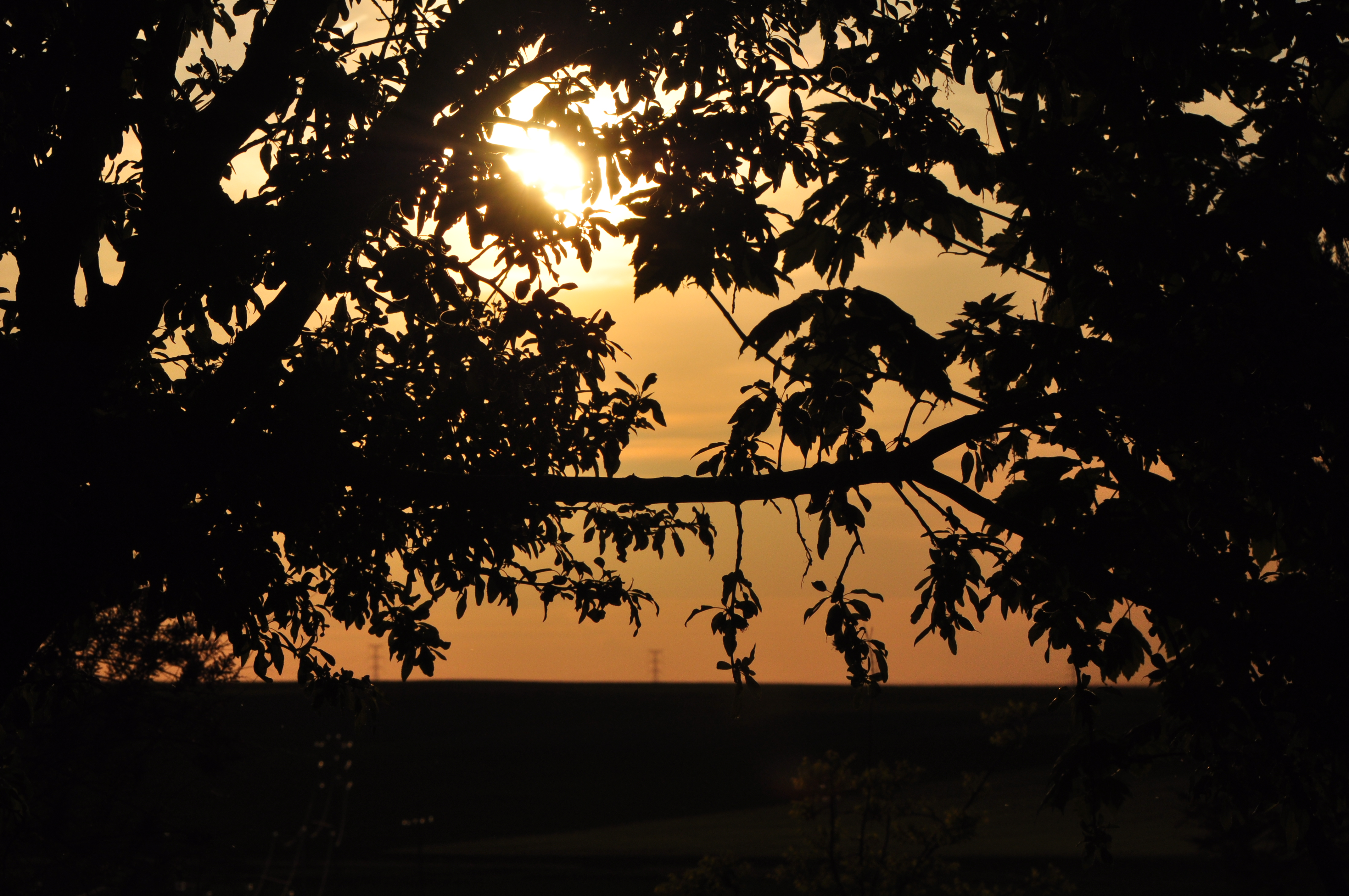 Atardecer desde Ventosa de la Cuesta, Valladolid (España).